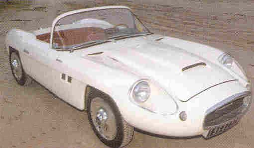 Voiture Sera créée par Jacques Durand